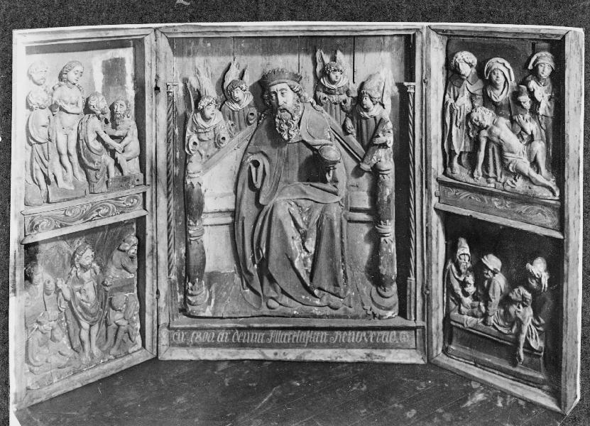 Altarskåp, mittscen med fragmentarisk Nådastol, 1500-talets början, renoverat 1800. Kategori: (05) AltarprydnaderAltarskåp, mittscen med fragmentarisk Nådastol, 1500-talets början, renoverat 1800.